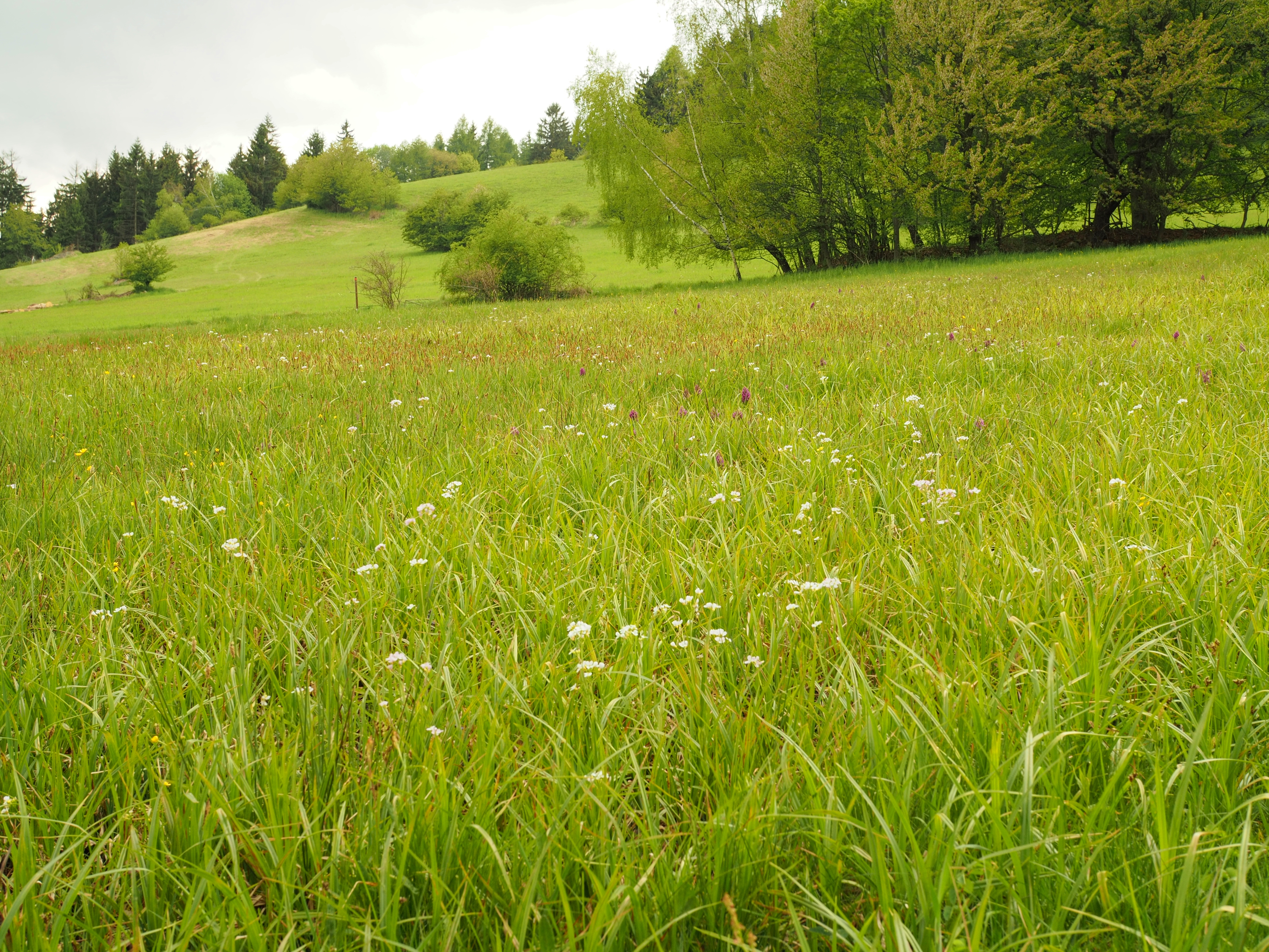 Přírodní památka Javorův kopec (Natural monument Javorův kopec), pohled na louku Project: Chráněná území.